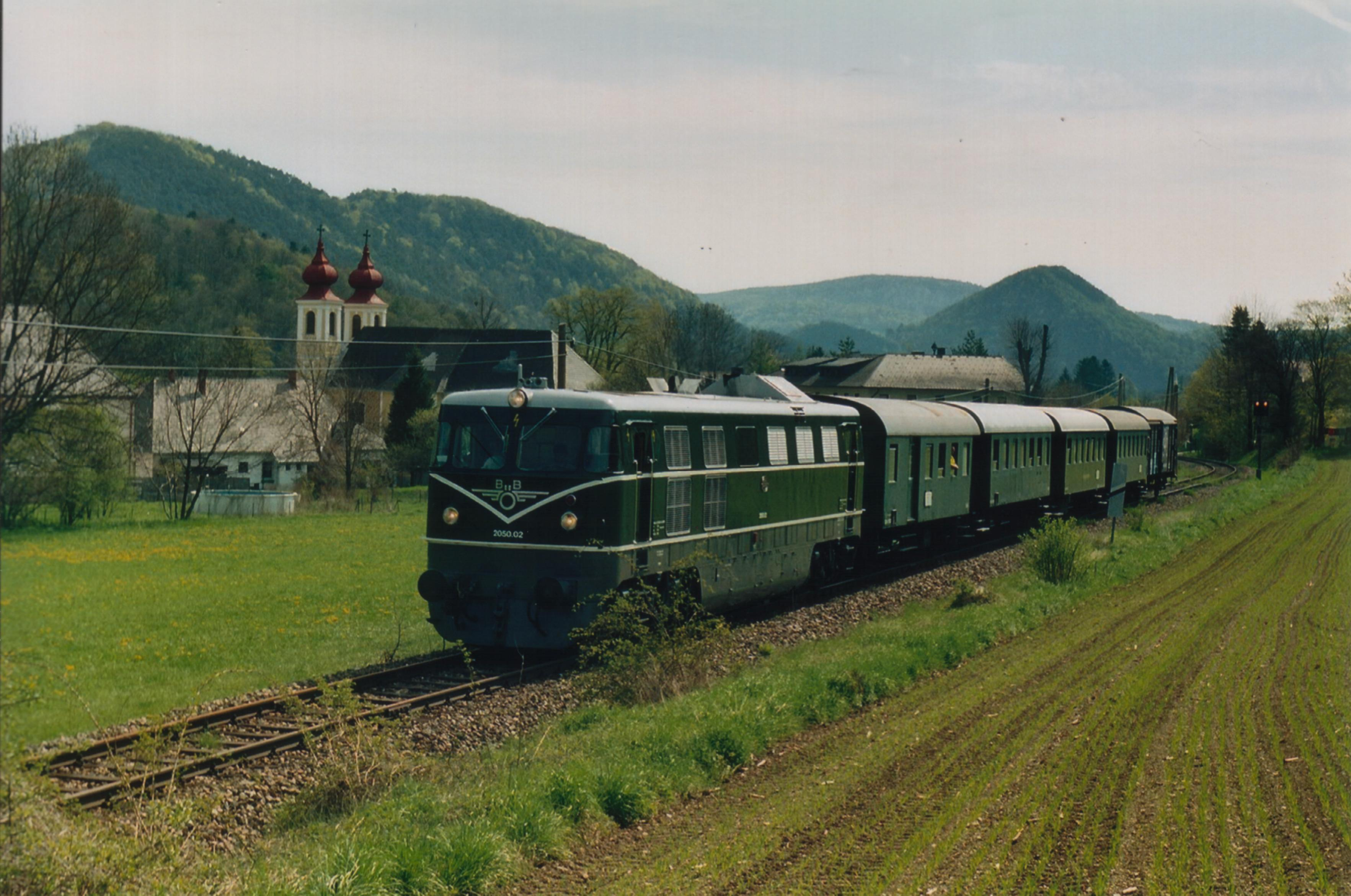 author: Johann Blieberger